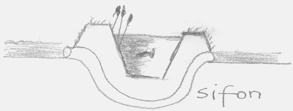 zelf getekend & gescand - mag worden vervangen door een betere afbeelding - Rik 8 sep 2005 22:40 (CEST)